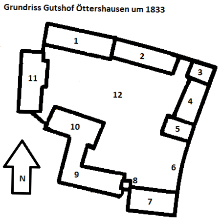 Skizze Aufbau Öttershausen vor 1833, 1 u. 2) Stallbauten 19./20. Jahrhundert, 3) Verwalterhaus 1765, 4) Remise 1775, 5) Gesindehaus 1858, 6) Scheune I (nicht auf dem Plan) 19. Jahrhundert, 7) Scheune II 16. Jahrhundert, Umbau 1741, 8) Treppenturm, 9) Winkelbau und Brennereibau 16. Jahrhundert, Umbau 1745 bis 1747, 10) Schüttbau 1745, 11) Scheune III 1609, 12) Hofareal von Mauern eingefasst